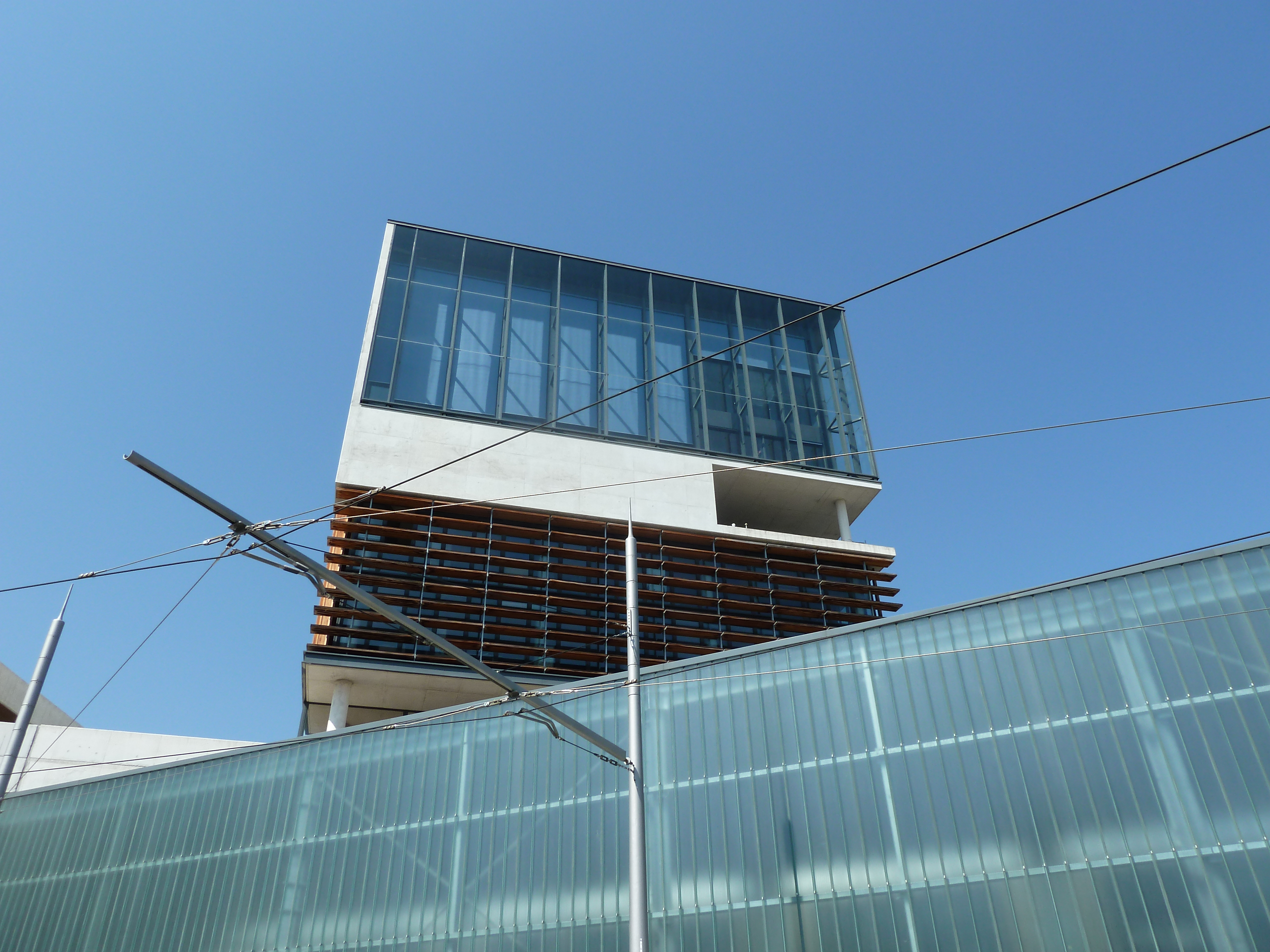 Œuvre "Disque solaire" de Ange Leccia